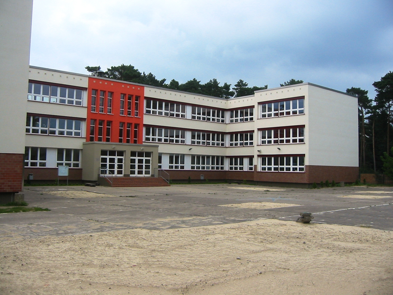 Schulgebäude in der Seestraße in Lubmin, einer Gemeinde im Landkreis Ostvorpommern